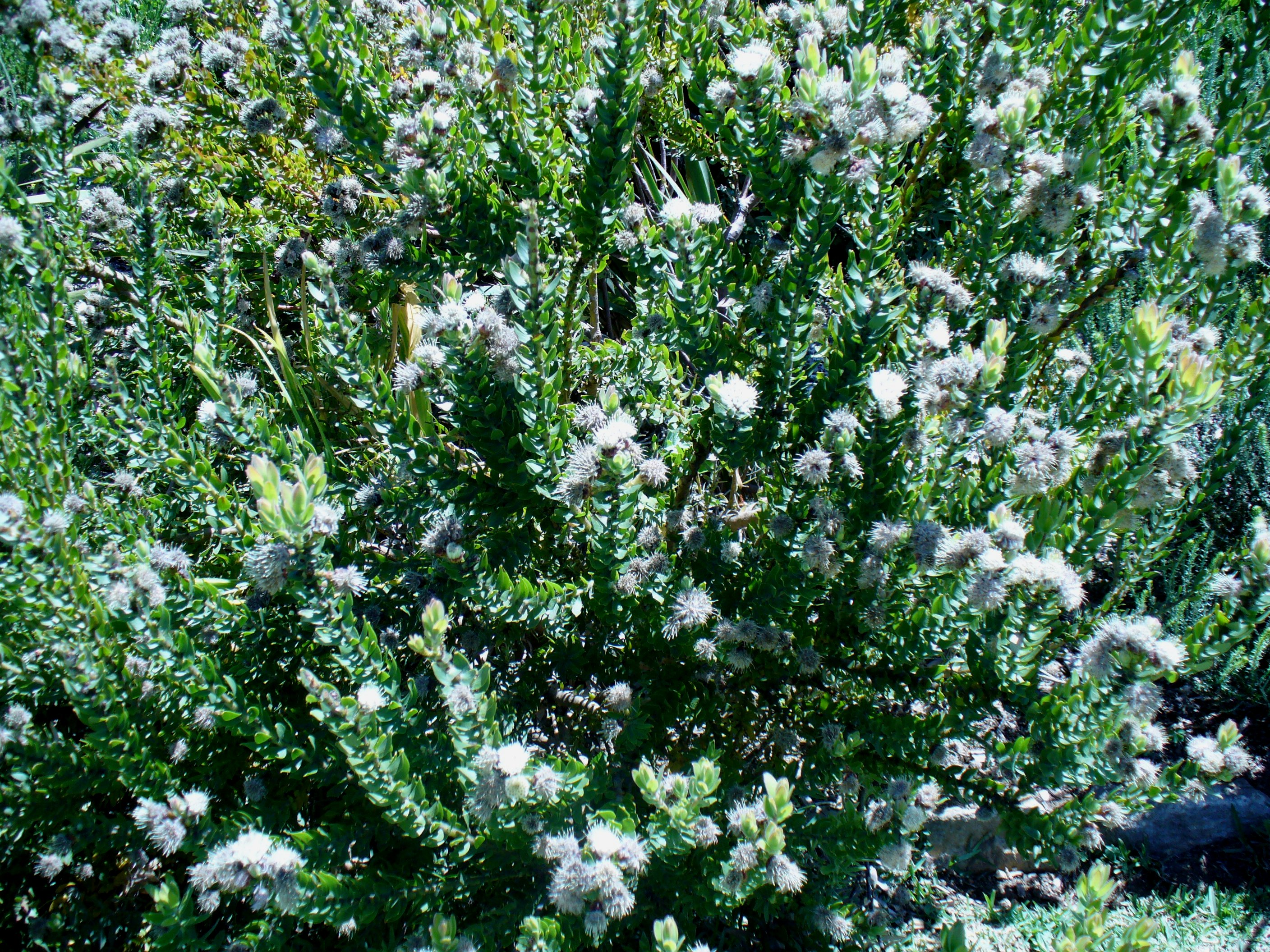 Leucospermum bolusii bush